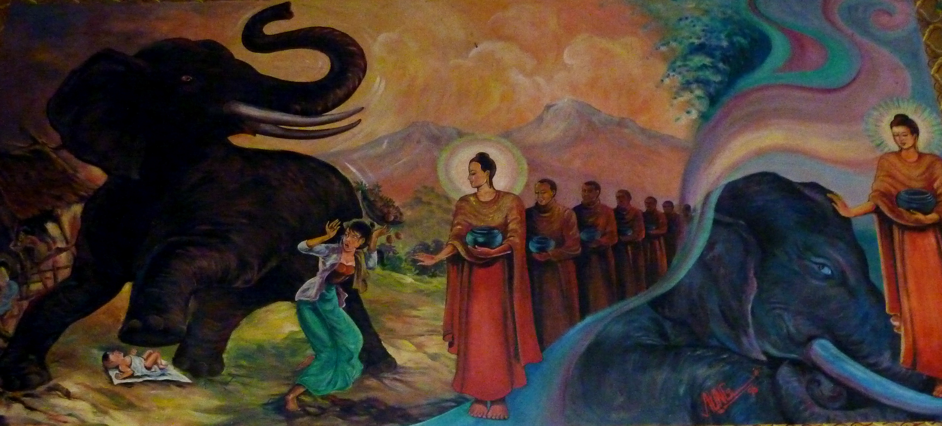 072 The Defeat of Nalagiri, at Wat Olak Madu, Kedah